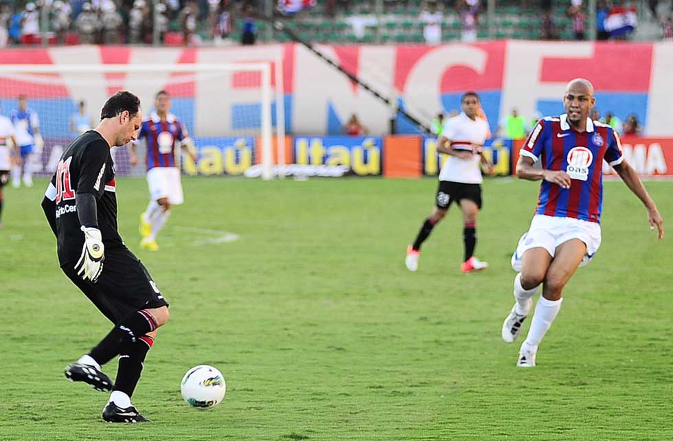 2012-09-02_Campeonato Brasileiro 2012_Série A_Bahia 1 x 0 São Paulo_Estádio Roberto Santos_PItuaçu